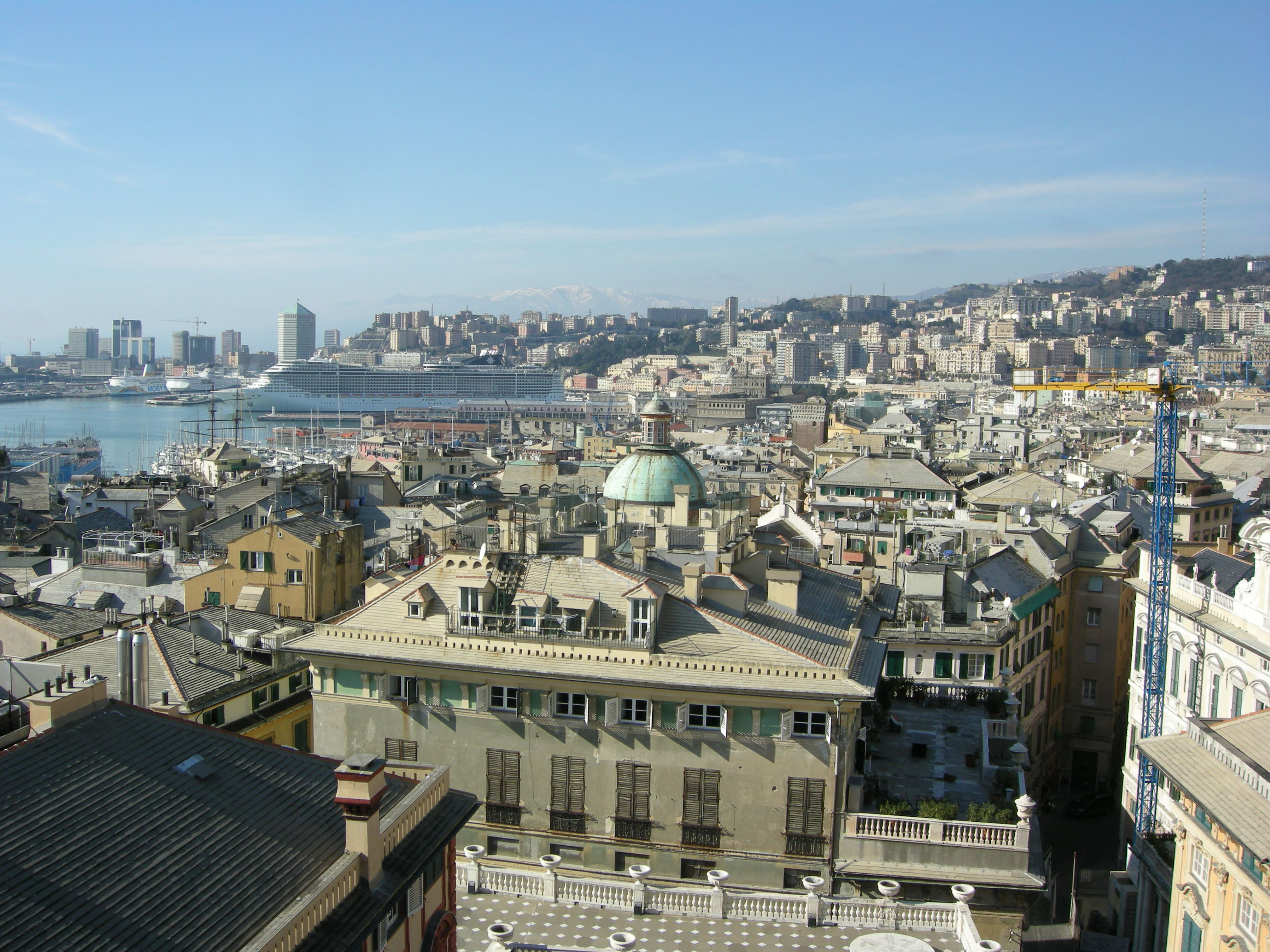 Veduta dalla terrazza sul tetto di palazzo rosso